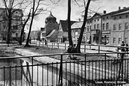 Nowa Synagoga w Lesznie